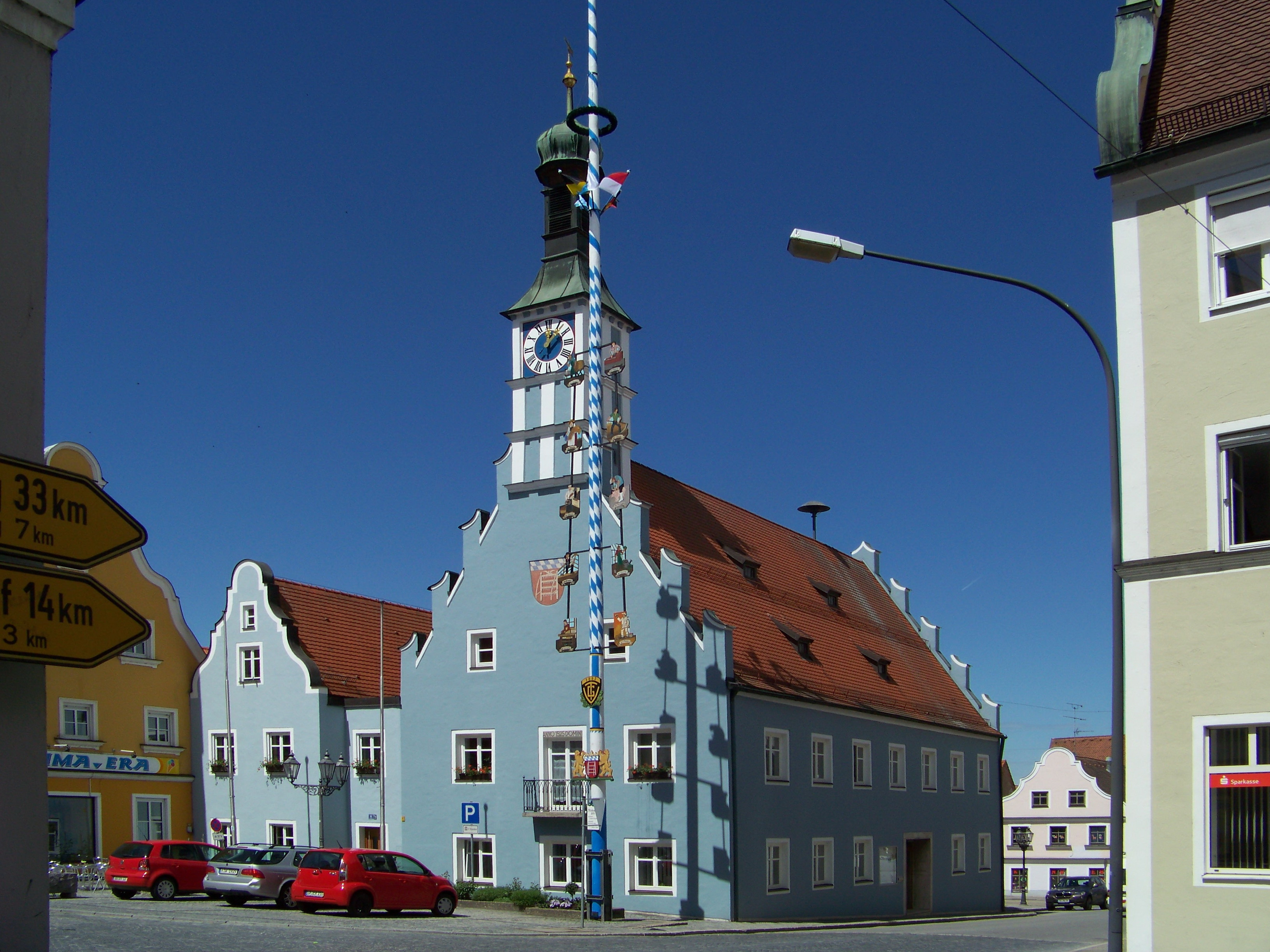 Geiselhöring. Anlage mit Staffelgiebel, 1525 erbaut, erneuert im 17. und 18. Jahrhundert, barocker Giebelturm.